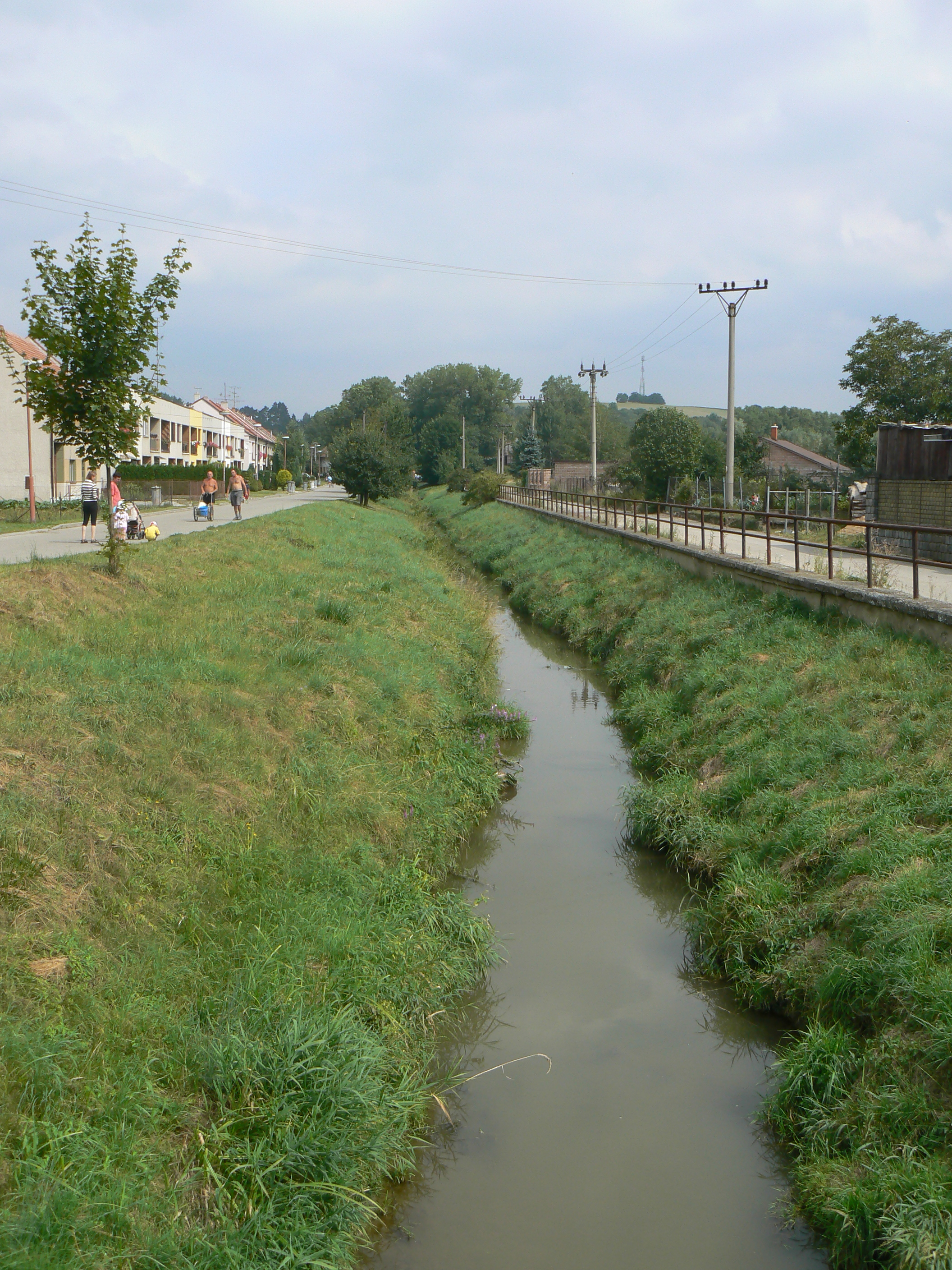 Česky: Řeka Litava, Brankovice.